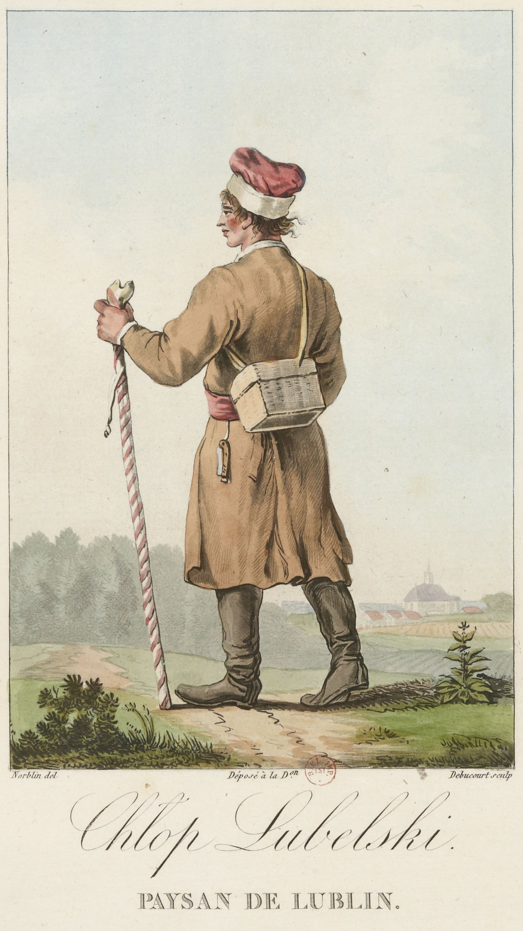 Крестьянин из Люблина